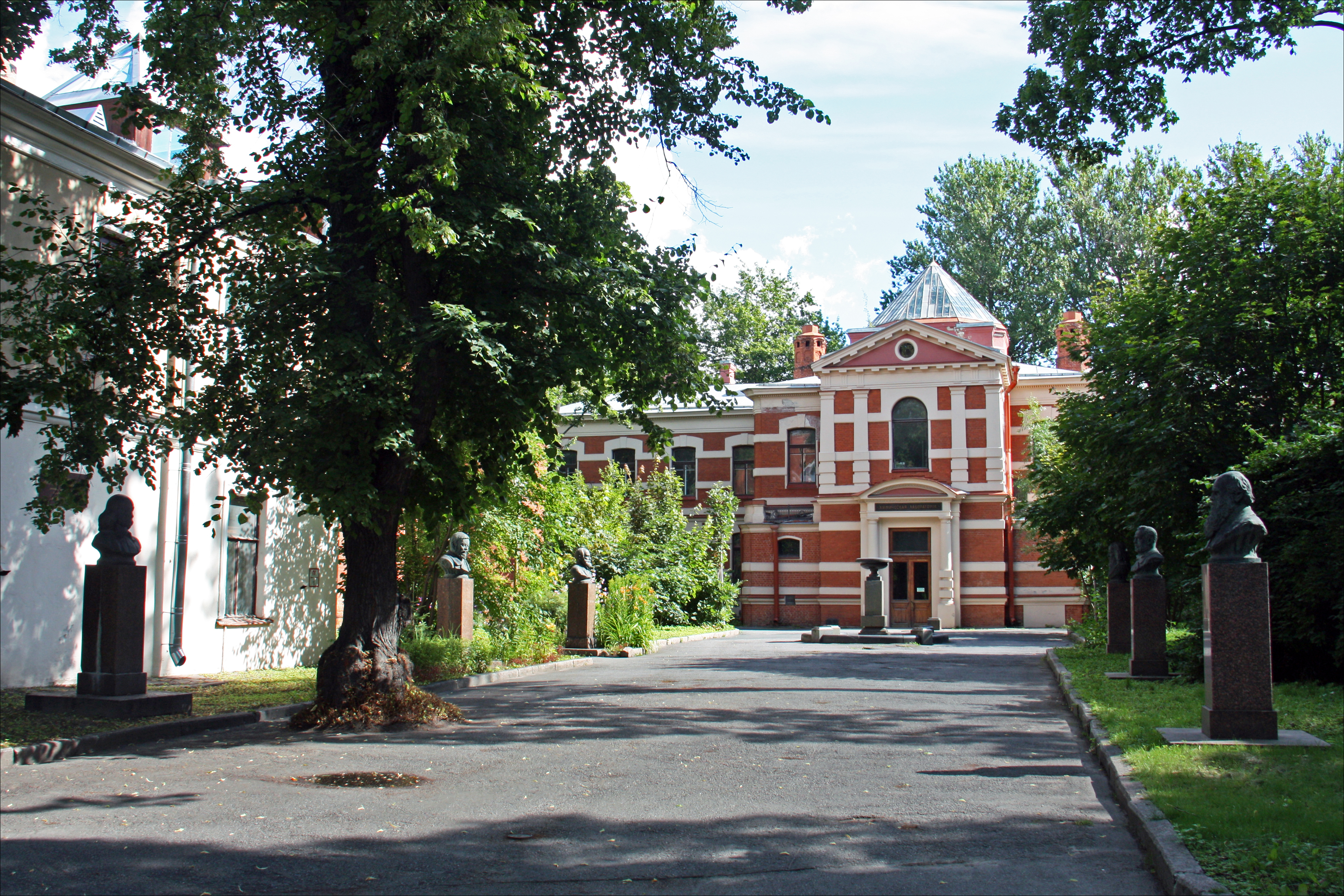 Лаборатория химическая: улица Академика Павлова, 12, Петроградский район, Санкт-Петербург